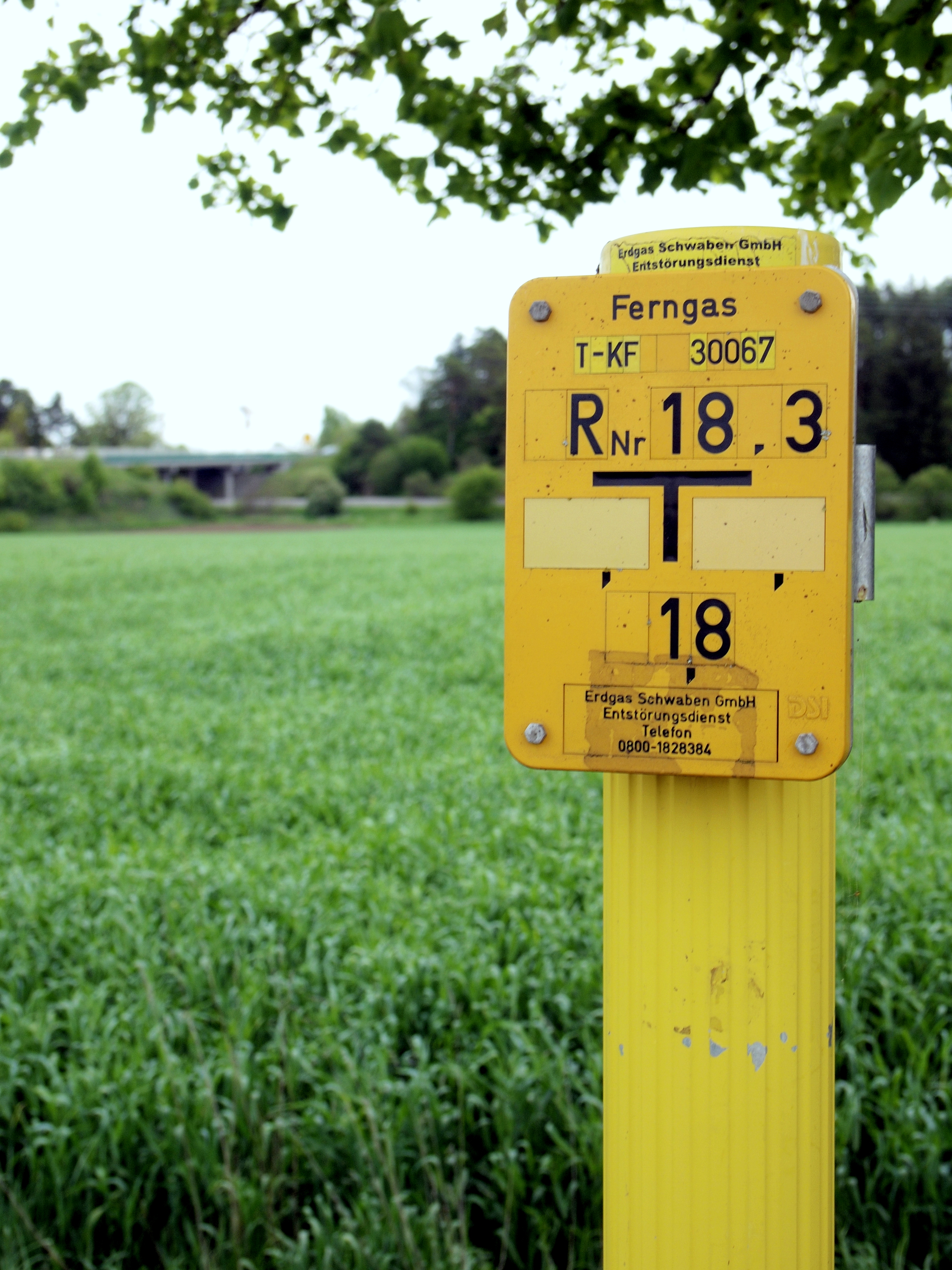 Sichtmarker (Marker) eines Richtpfahls einer Ferngas-Rohrleitung der Erdgas Schwaben bei Pforzen, Landkreis Ostallgäu